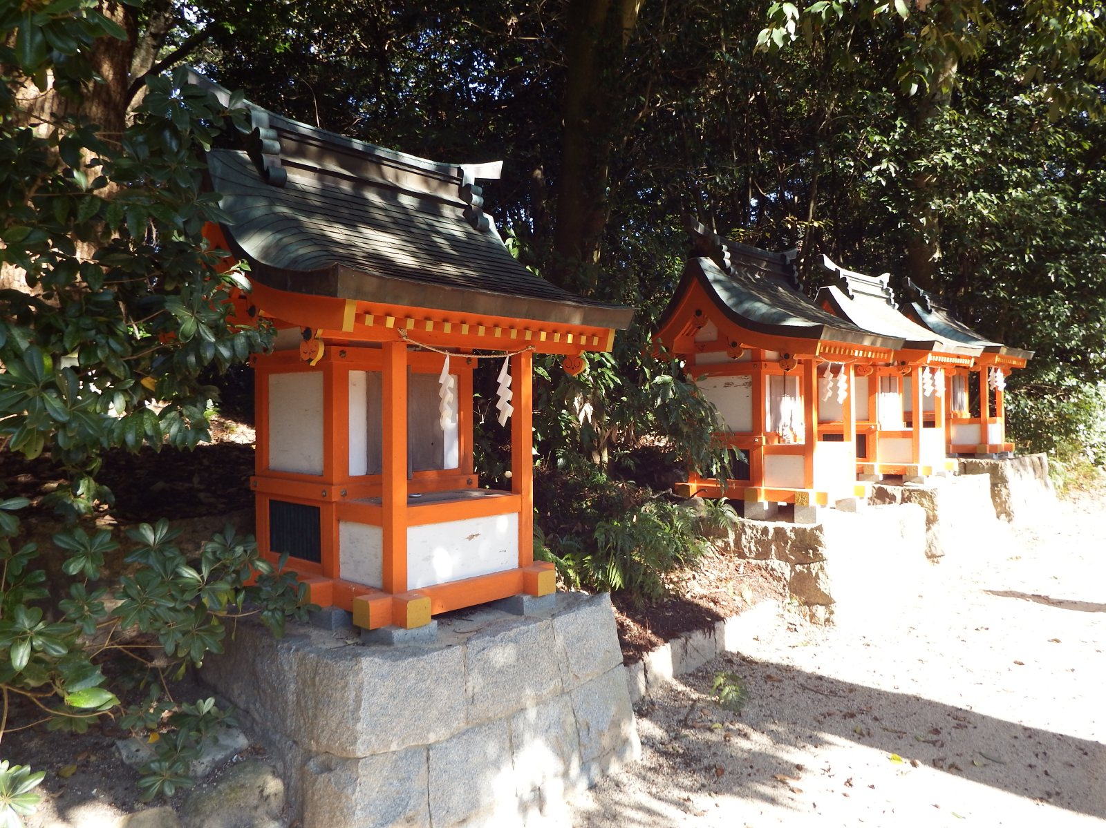 大山祇神社（手前より）石神社・稲荷神社・地神社・院内荒神社